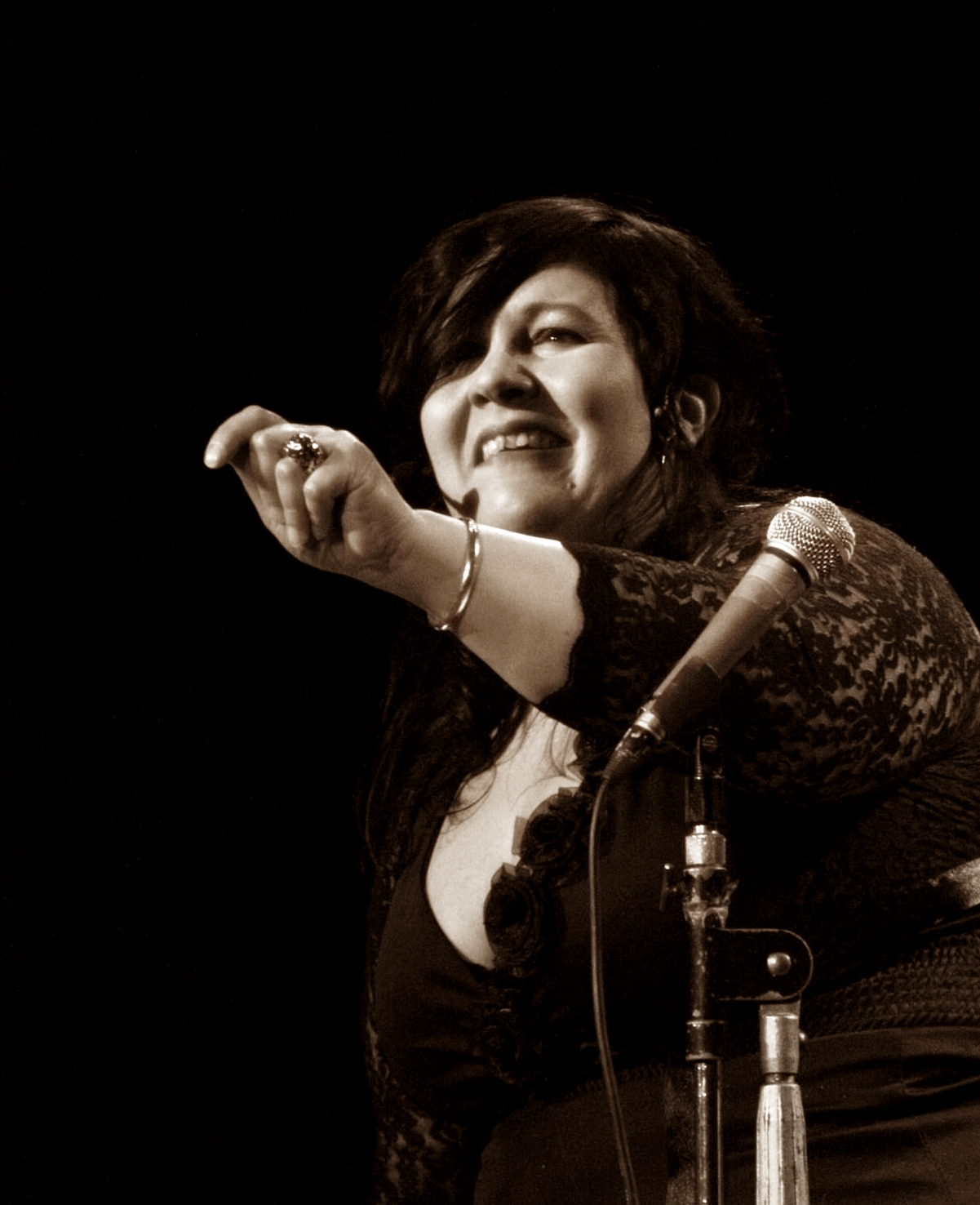 Mariana Dátola es una cantante nacida el 8 de noviembre de 1975 en la ciudad de Tandil,provincia de Buenos Aires,Argentina.Se define como artista autodidacta. Se puede apreciar en sus trabajos musicales,la presencia de las temáticas de género. Combina música y poesía,dándole un carácter teatral a la hora de interpretar.